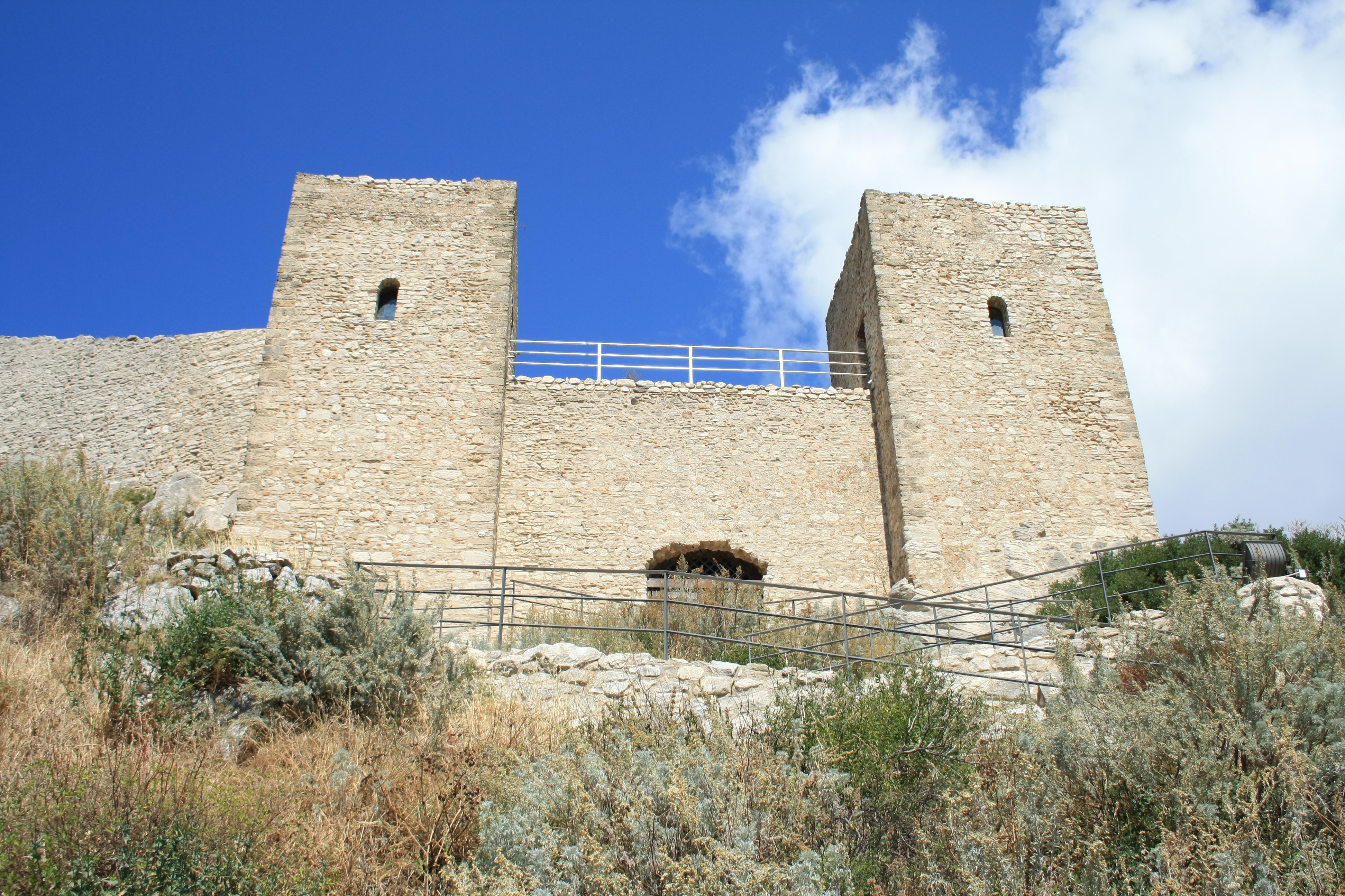 Le torri e il portale del castello di San Niceto (Motta San Giovanni) Italy.